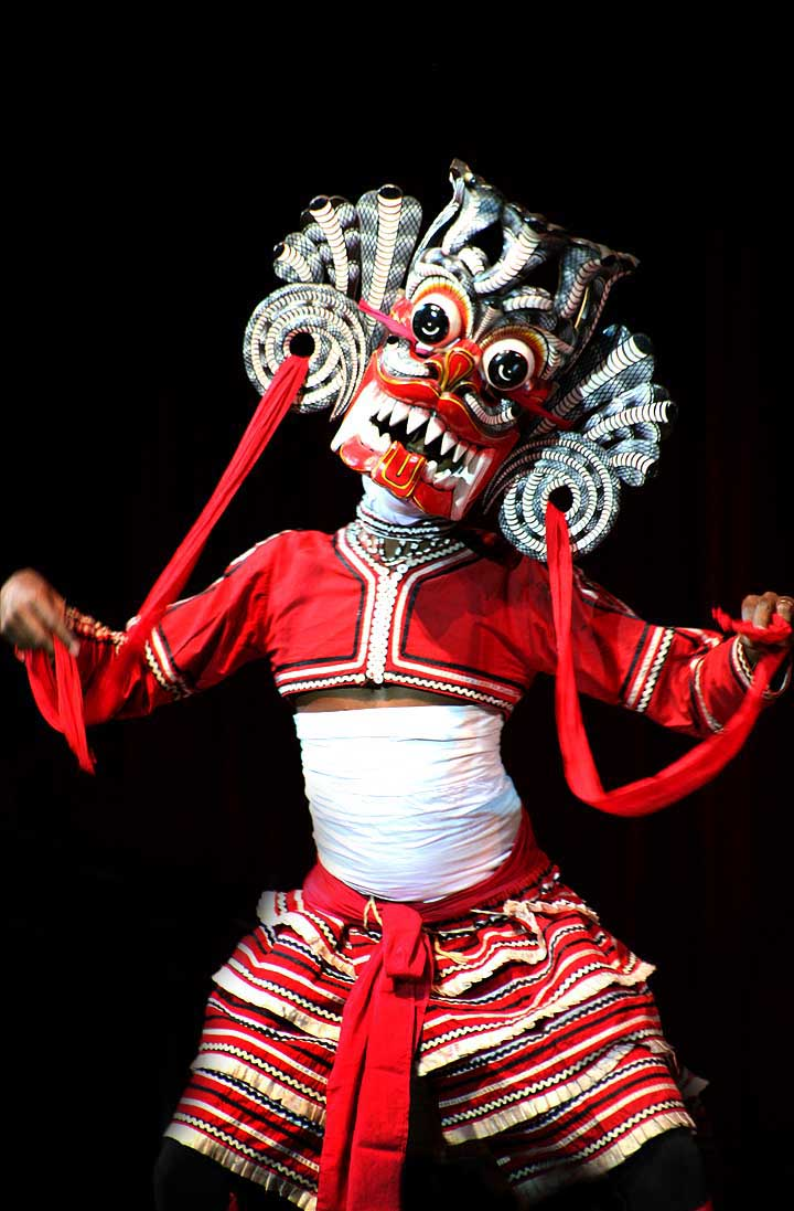 Sri Lanka: Ceremonial Dancer